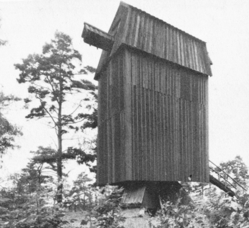 Edholma gårds kvarn